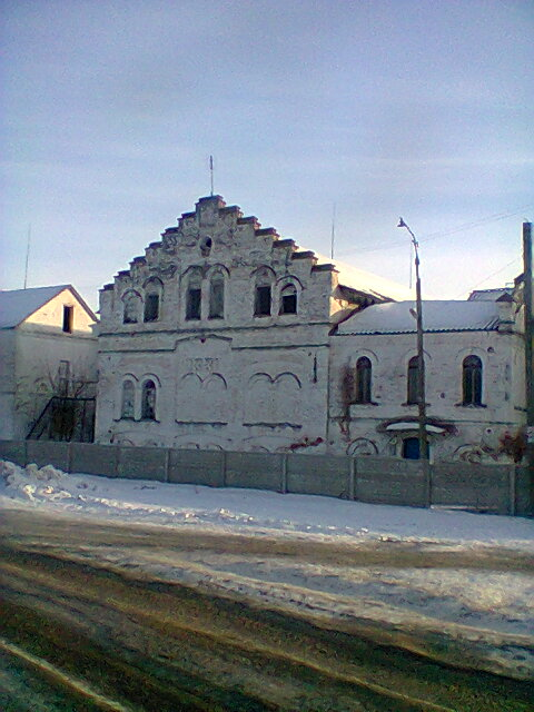 Водяний млин (1881)